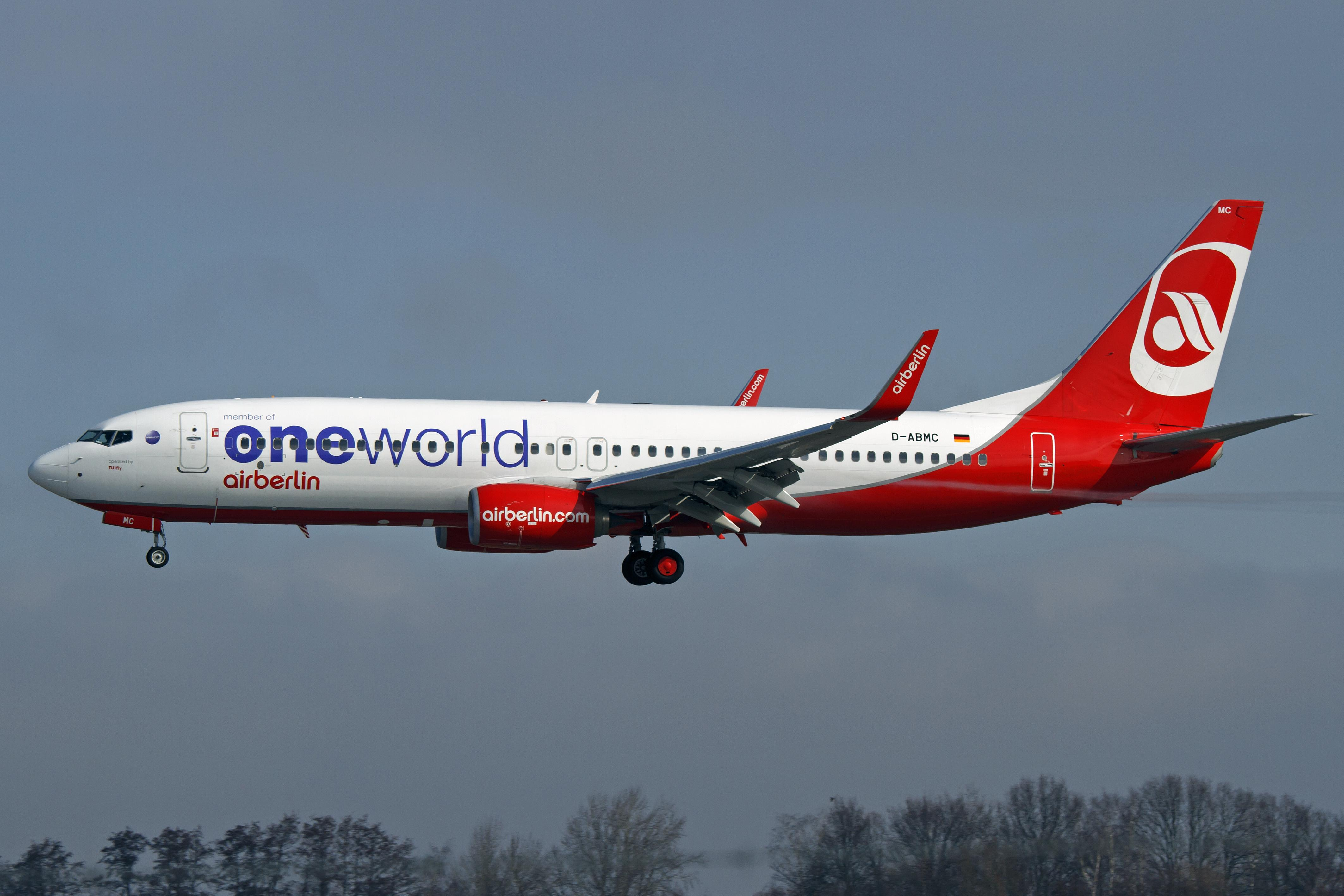 D-ABMC